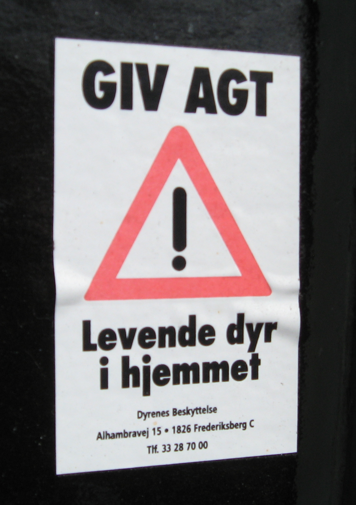 GIV AGT! Levende dyr i hjemmet!